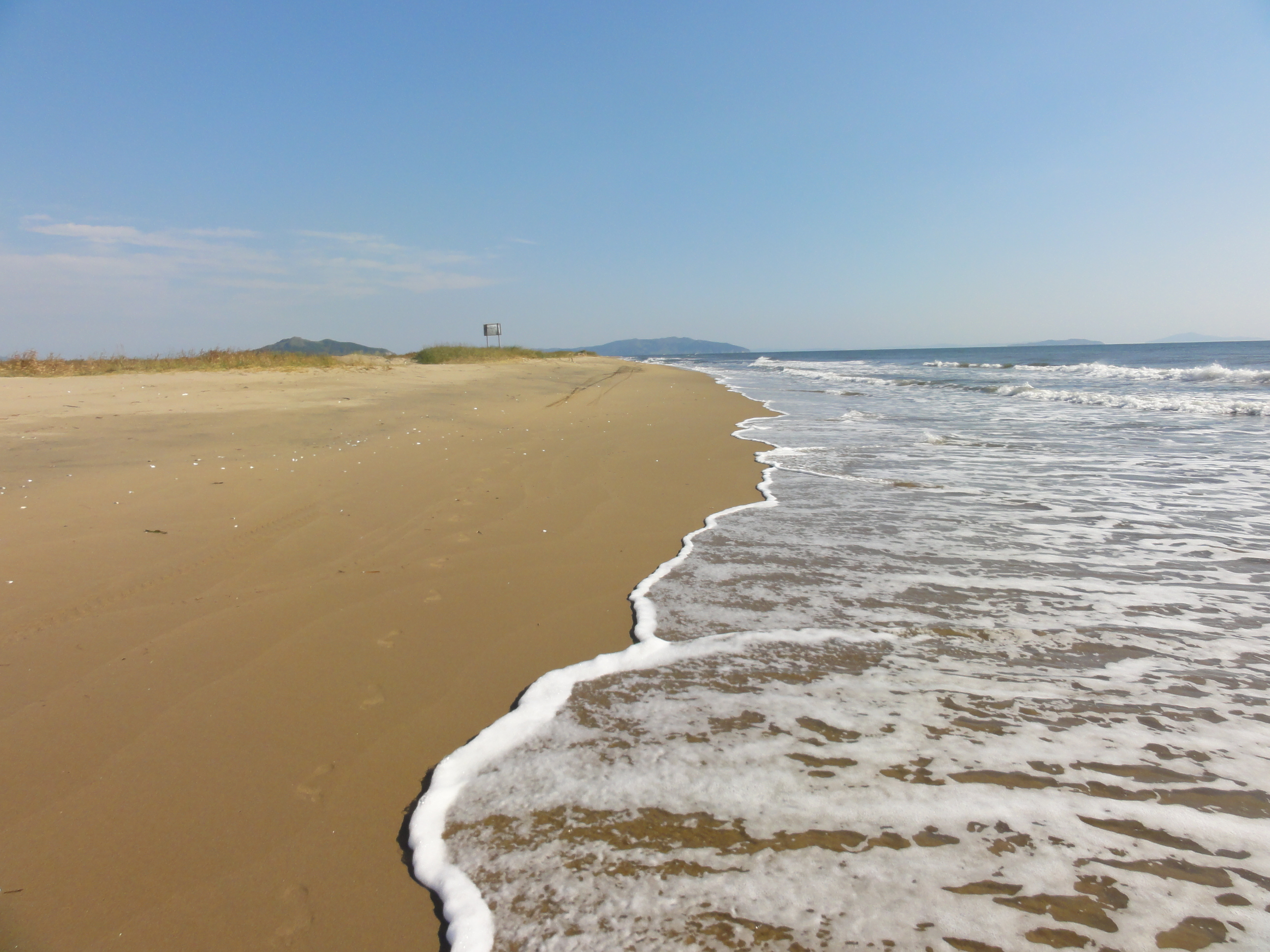 Юго-западное побережье залива Петра Великого. На заднем плане слева направо: г. Голубиный Утёс, г. Бутакова, о. Фуругельма, п-ов Гамова.